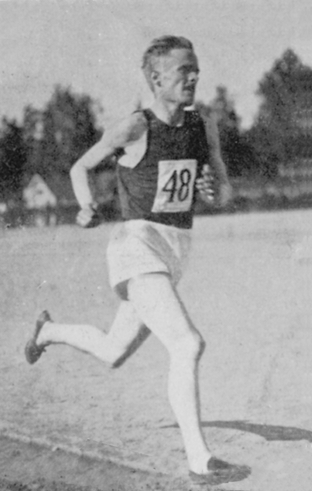 Format: Samlekort Dato / Date: ca. 1930 (dokumentet) Fotograf / Photographer: Ukjent Wikipedia: Eino Purje (1900 - 1984) Eier / Owner Institution: Trondheim byarkiv, The Municipal Archives of Trondheim Arkivreferanse / Archive reference: Sportsklubben Freidig: Sigarettfoto ca. 1930 (Løpenr. 75) F23916 Tekst på baksiden: Eino Purje (Borg), finnernes glimrende mellemdistanseløper gjorde sig særlig bemerket i Amsterdam 1928 ved den hårde kamp om gullmedaljene der. Han satte straks efter ny rekord p 1/4 engelsk mil (2011 m.) med 5,26,4. Merknad: Disse samlekortene med bilder av norske og internasjonale idretthelter fulgte med i sigarettpakker på 1920 og 30-tallet - derav tobakksreklamen på baksiden. Samlekortene kommer fra Sportsklubben Freidigs arkiv, og inneholder nærmere 90 unike kort pent plassert i et samlealbum. Samleren var den senere skipsmegler Finn Følling (1914 – 1985).